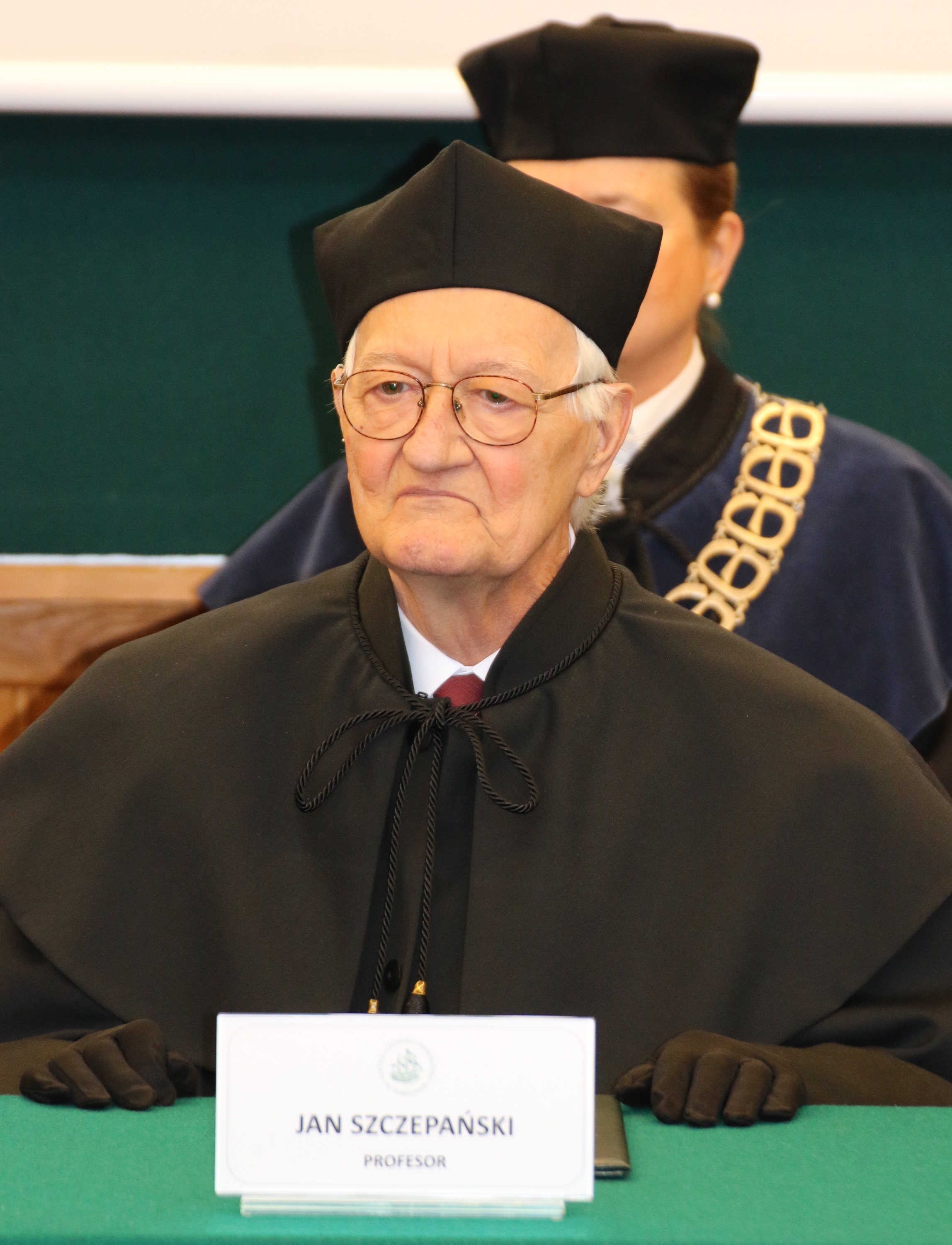 Prof. Jan Szczepański podczas uroczystego posiedzenia Senatu SGH poświęconego odnowieniu jego doktoratu.